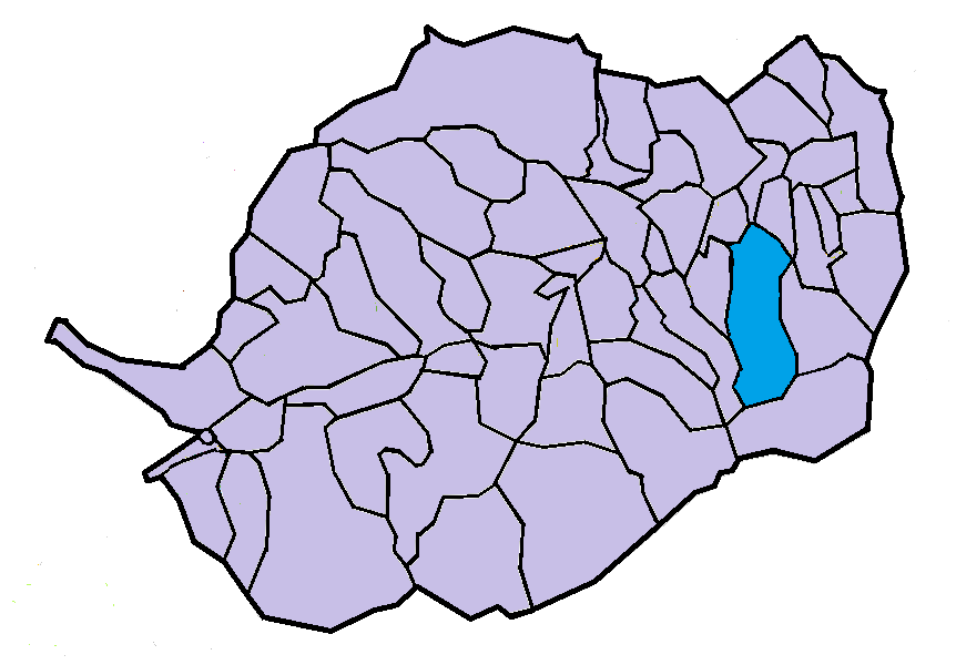 Estoer en el Conflent, a partir del mapa municipal del Conflent de lliure disposició adaptat al Nomenclàtor toponímic aprovat el 2007